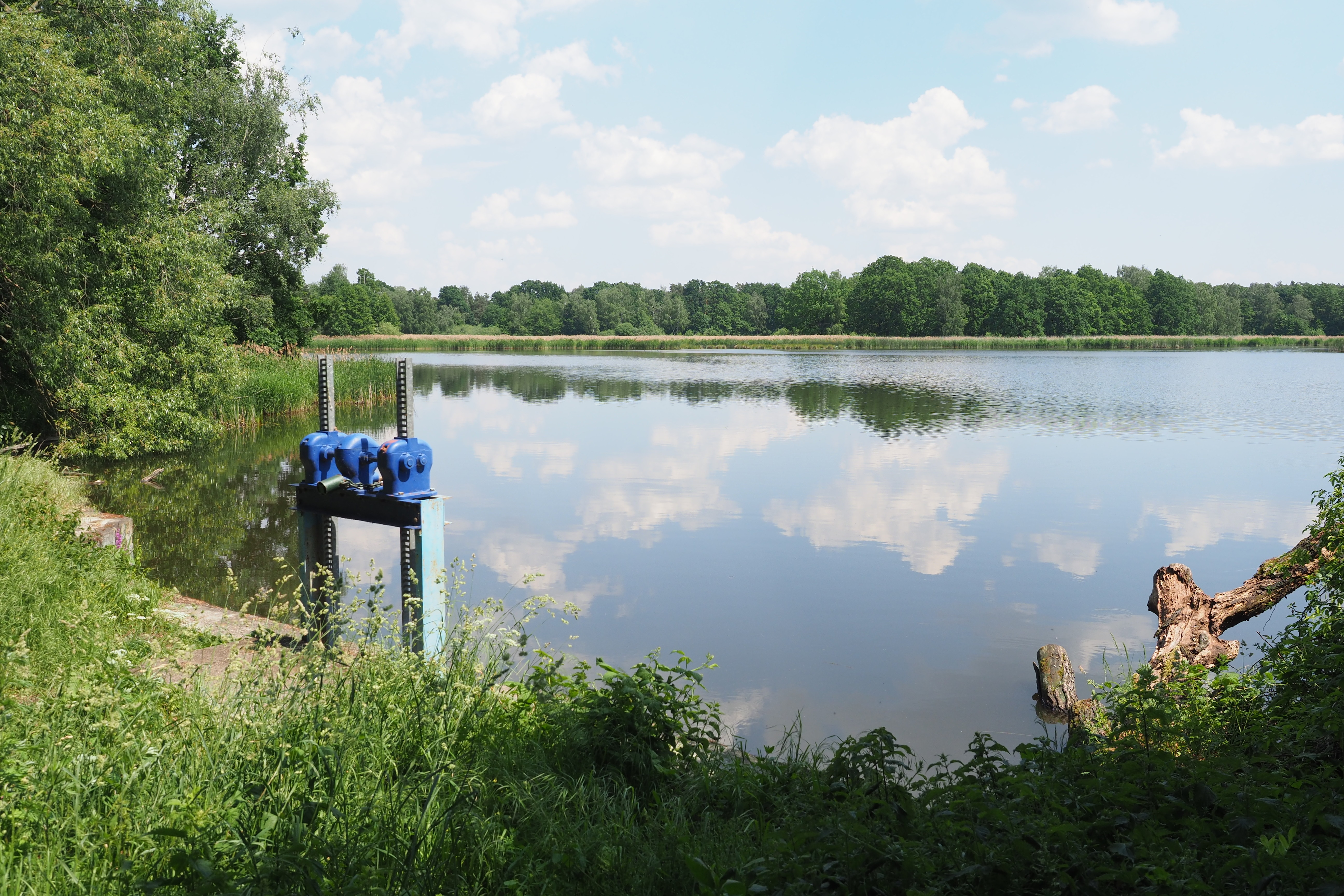 Naturschutzgebiet Vierteich Freitelsdorf in Sachsen